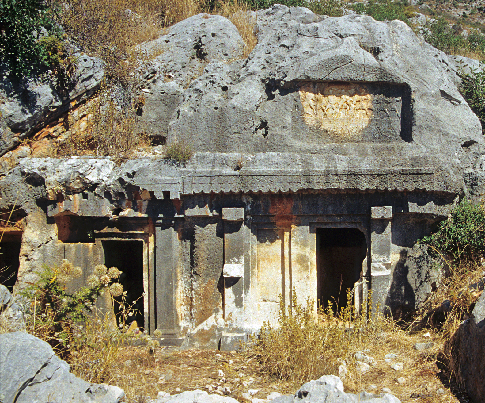 Limyra, Südwesttürkei, Felsengrab